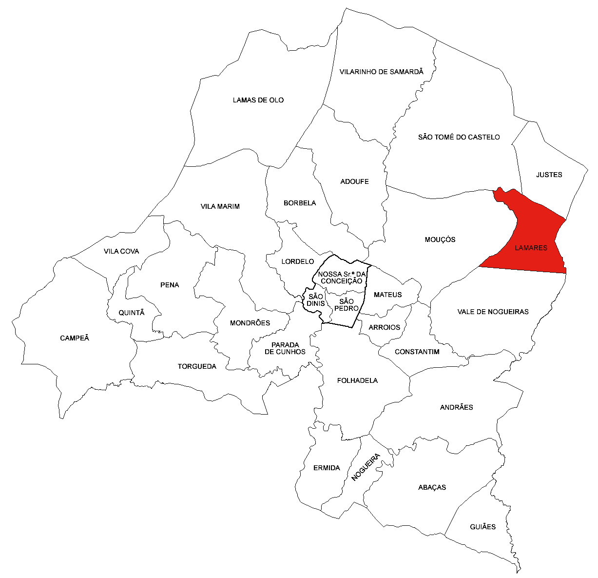 Freguesia de Lamares (concelho de Vila Real)